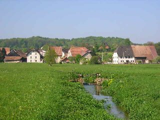 Village de Thiancourt (Territoire de Belfort) Photo prise par LP90 en mai 2004 Licence GFDL LP90 mai 2004